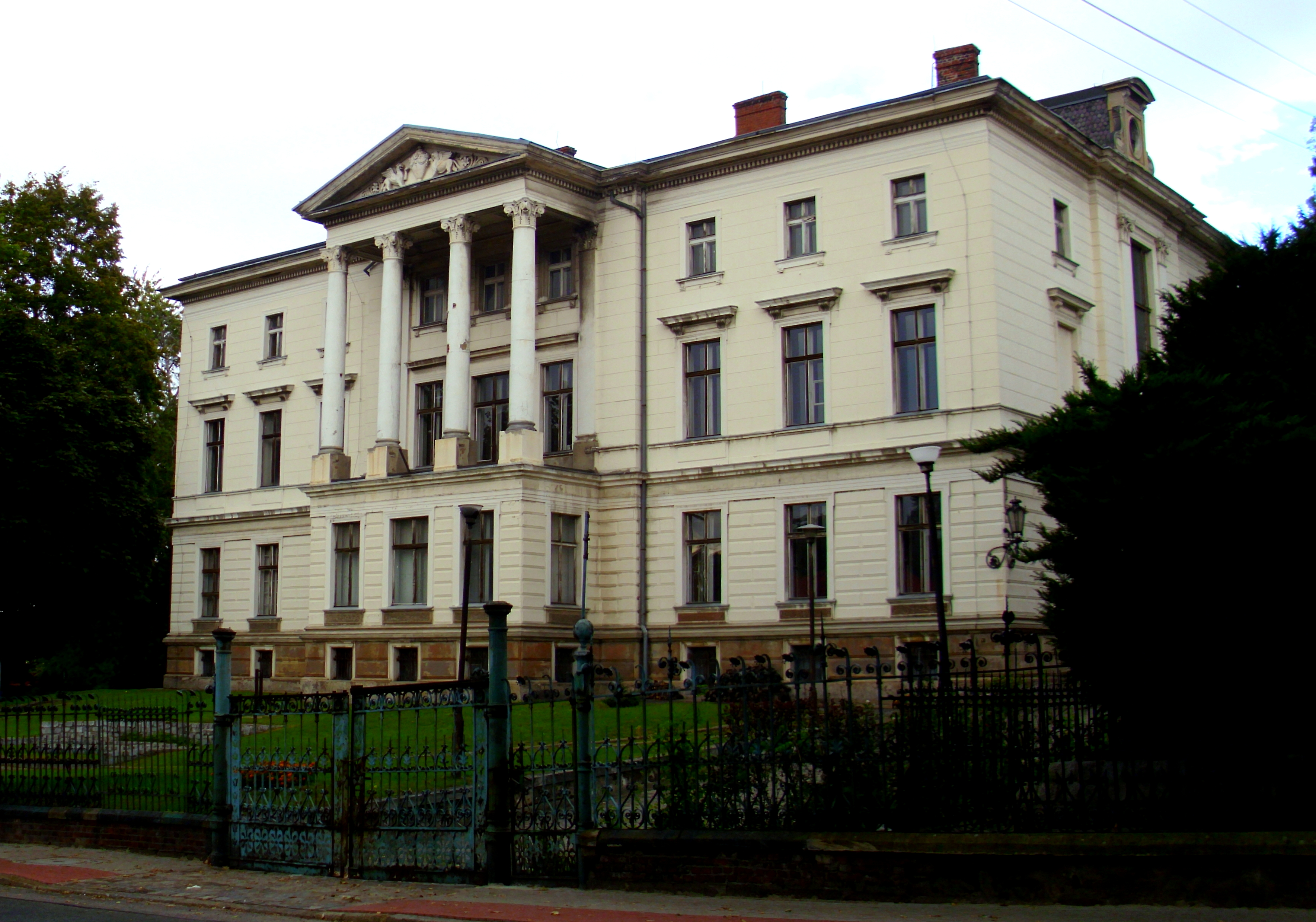 Willa Ernsta Fränkla i Maxa Pinkusa poł. XIX w. Do 1936 roku mieściła w sobie słynną „Bibliotekę Śląską”. Wykorzystywany po drugiej wojnie światowej jako zakładowe przedszkole „ZPB Frotex”, budynek stanowi obecnie własność prywatną. 11.1991.